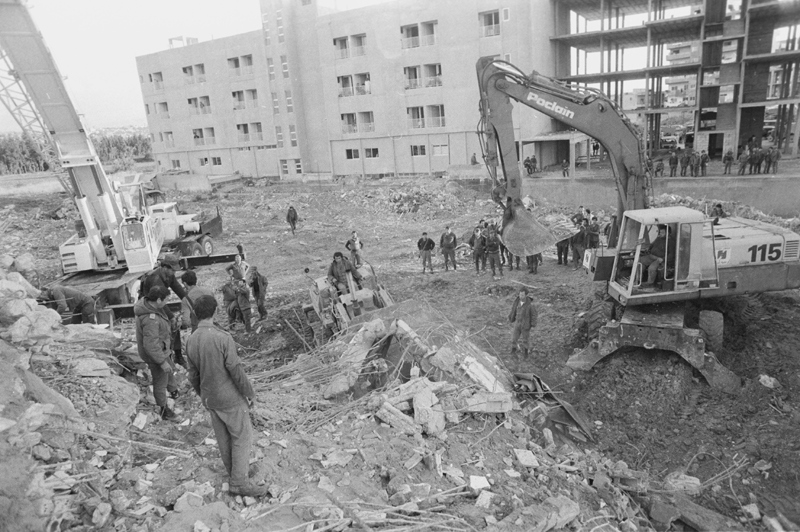 אסון צור הראשון- פינוי נפגעים, פינוי הריסות מבניין הממשל הצבאי בצור שבלבנון באמצעות עגורן.